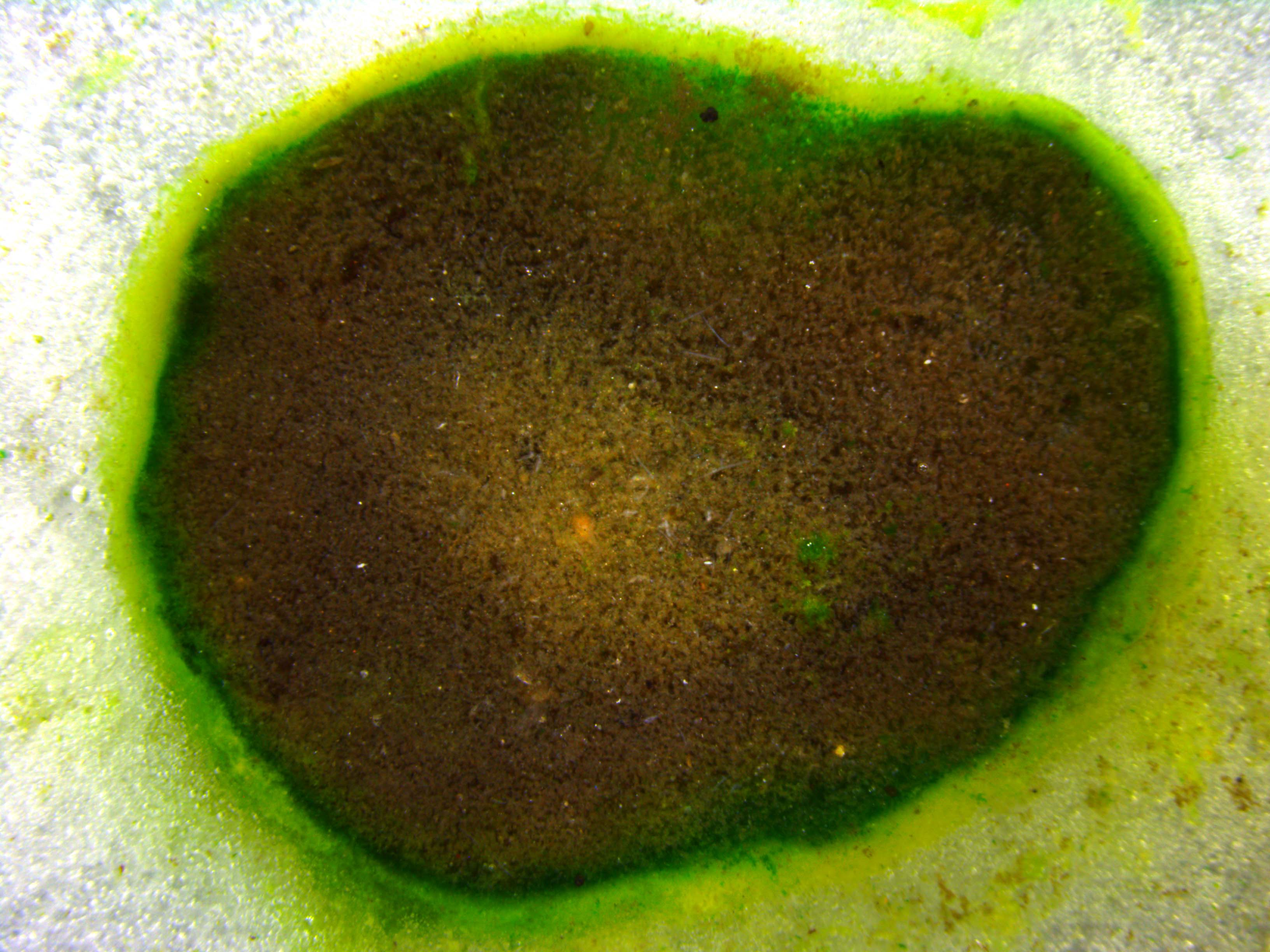 Cross section of an OPG cultivated under static conditions